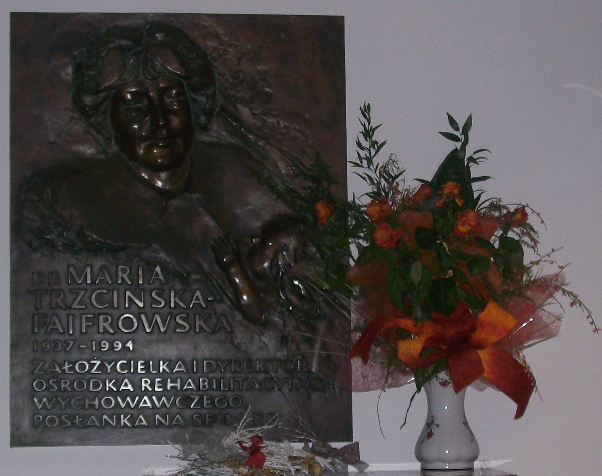 Description: Tablica upamiętniająca Marię Trzcińską-Fajfrowską założycielkę Domu Specjalnej Troski w Giszowcu. Katowice-Giszowiec, ulica Gościnna 8. Author: Ewkaa